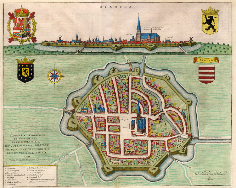 Dixmuda